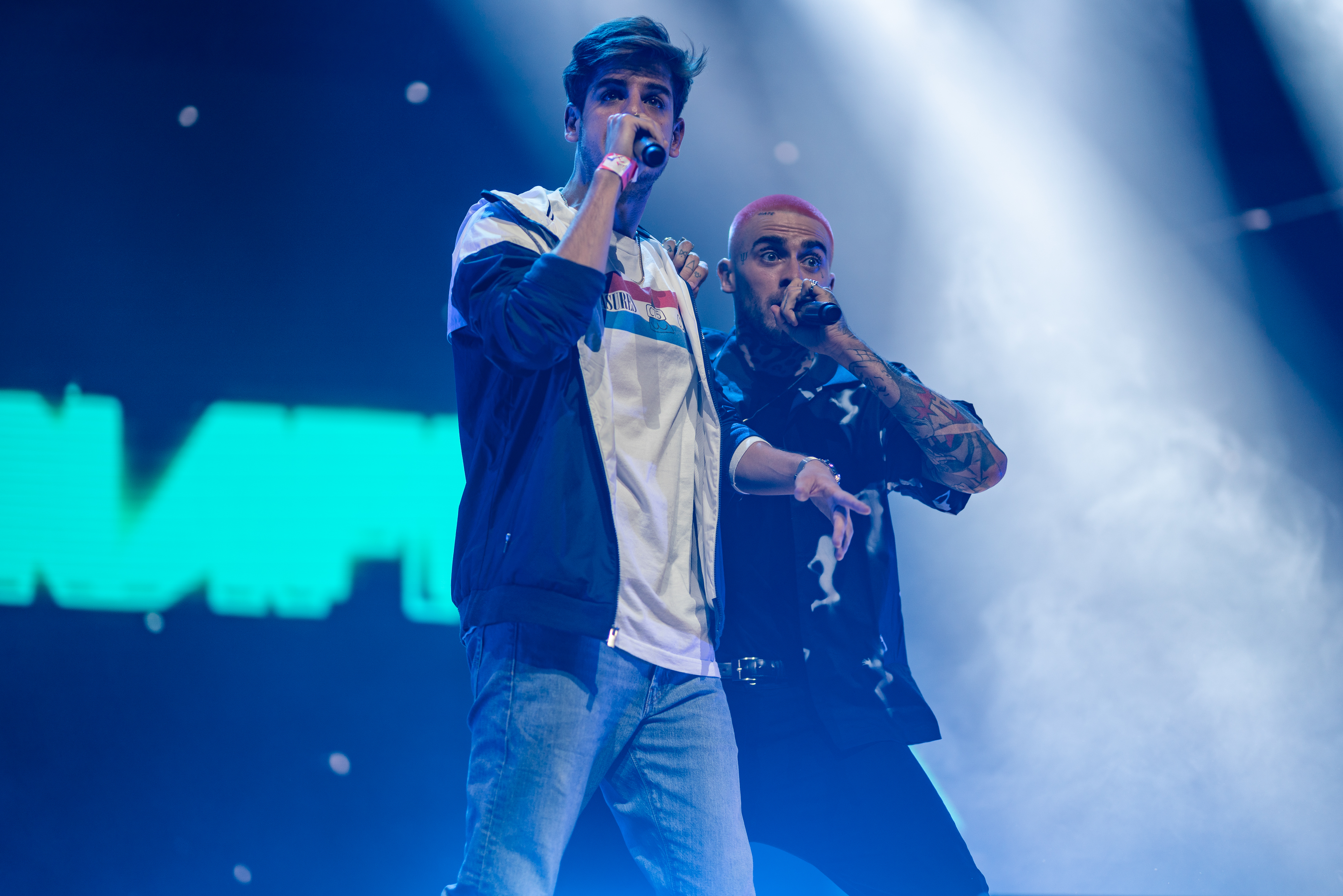 Taconafide podczas koncertu w Warszawie w ramach trasy Ekodiesel Tour promującej debiutancki album Soma 0,5 mg.